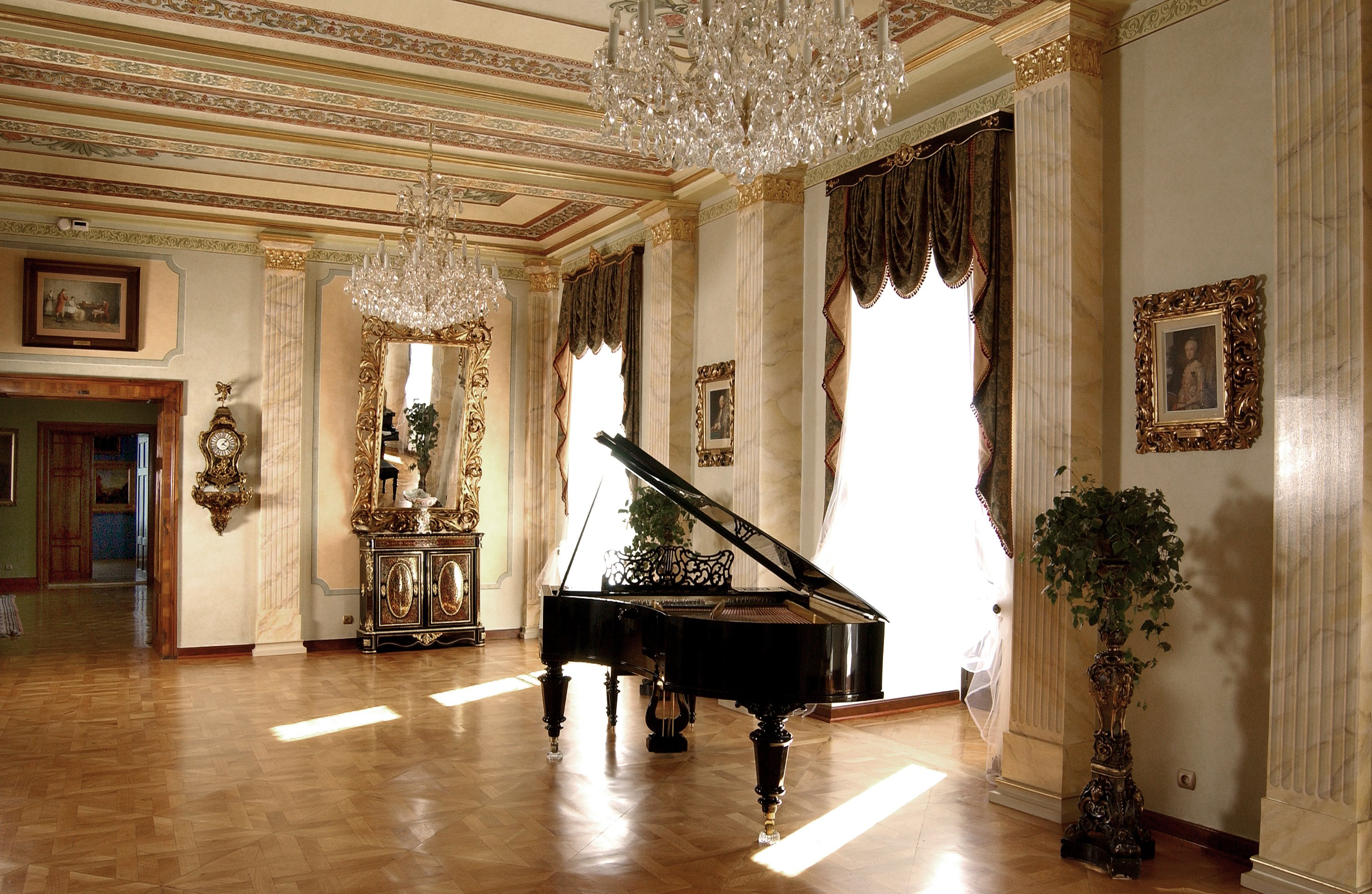 Jolanta Witalińska, Muzeum w Bielsku–Białej